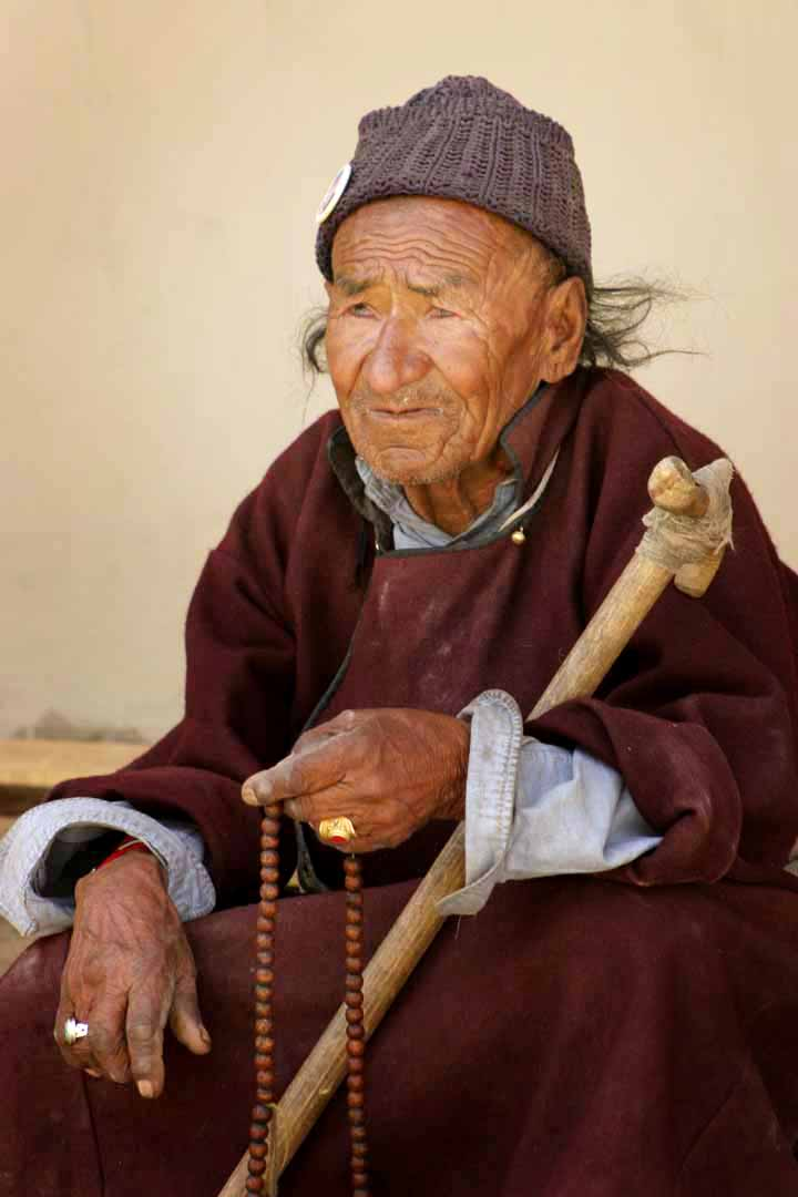 Ladakh